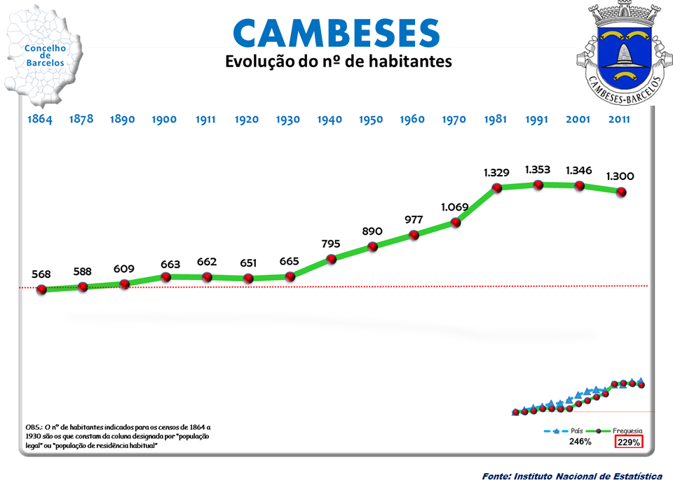 Censos 1864/2011